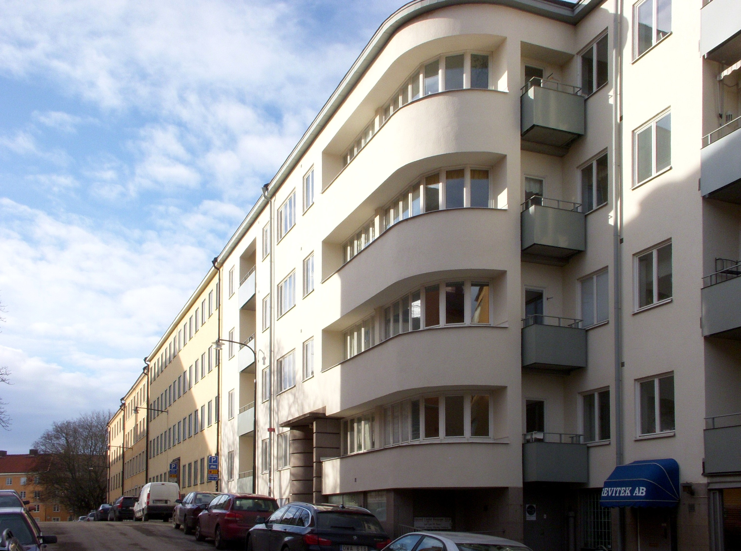 Helgalunden, Södermalm, kvarteret Kvadern, Allhelgonagatan 7-9, arkitekt Ture Sellman